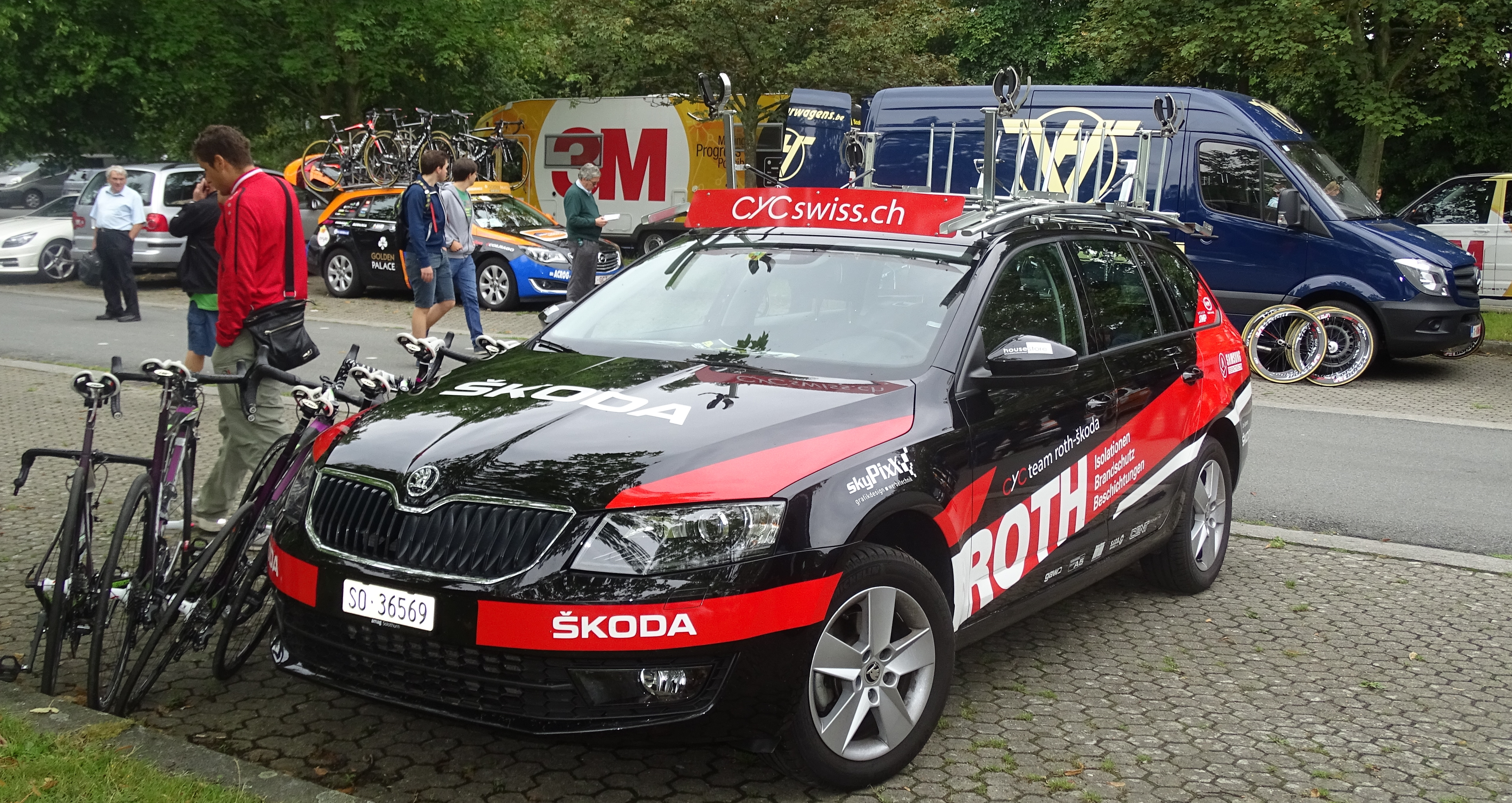 Reportage réalisé le mardi 18 août à l'occasion du départ et de l'arrivée du Grand Prix de la ville de Zottegem 2015 à Zottegem, Belgique.